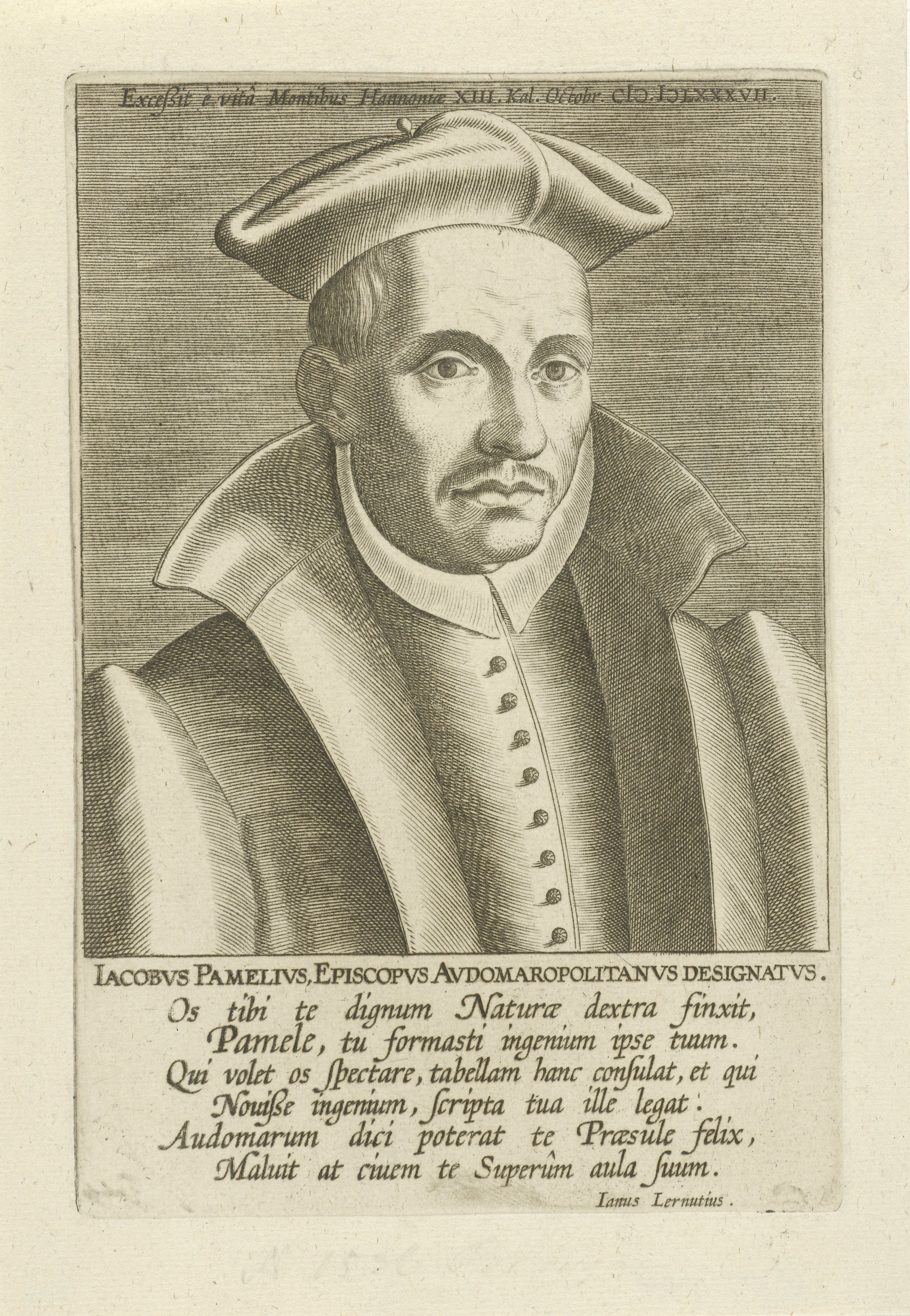 IdentificatieTitel(s): Portret van Jacob van PameleIacobvs Pamelivs (titel op object)Bekende schrijvers uit de Nederlanden (serietitel)Bibliotheca Belgica (serietitel)Objecttype: prent boekillustratie Objectnummer: RP-P-1906-680Catalogusreferentie: New Hollstein Dutch fig. 36-2(2)Opschriften / Merken: verzamelaarsmerk, verso midden onder, gestempeld: Lugt 2228Omschrijving: Portret van Jacob van Pamele, Theoloog uit Brugge. Buste naar rechts. De prent heeft een Latijns boven- en onderschrift en maakt deel uit van een serie van bekende schrijvers uit de Nederlanden.VervaardigingVervaardiger: prentmaker: Philips Galle (toegeschreven aan atelier van)schrijver: Janus Lernutius (vermeld op object)uitgever: Franciscus FoppensPlaats vervaardiging: prentmaker: Antwerpenschrijver: Antwerpenuitgever: BrusselDatering: 1608 en/of 1739Fysieke kenmerken: gravureMateriaal: papier Techniek: graveren (drukprocedé)Afmetingen: plaatrand: h 158 mm × b 106 mmToelichtingBoekillustratie uit Johannes Franciscus Foppers, 'Bibliotheca Belgica', Brussel 1739.OnderwerpWie: Jacob van PameleVerwerving en rechtenVerwerving: aankoop 1906Copyright: Publiek domein